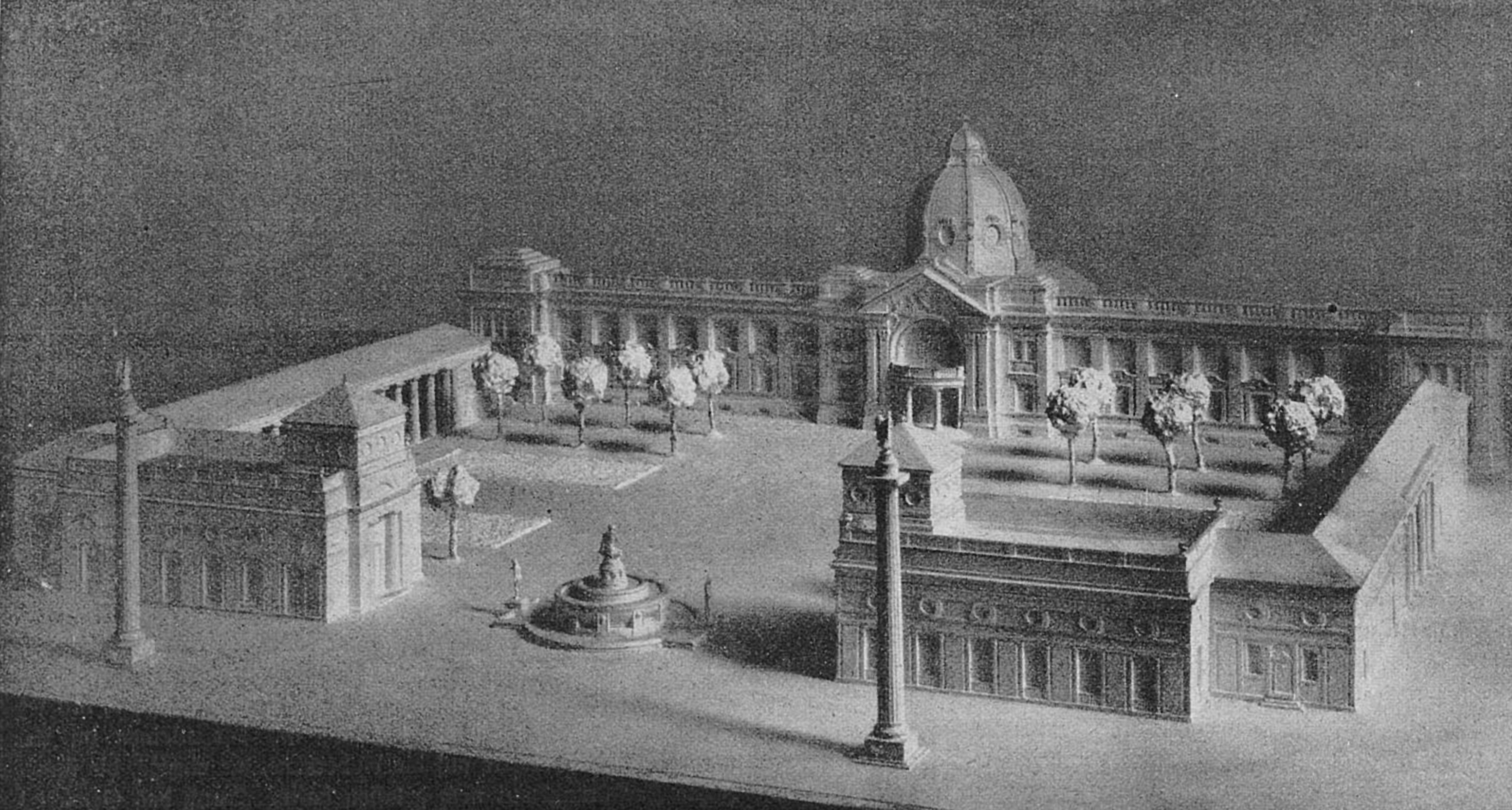 Der Düsseldorfer Kunstpalast und seine Vorbauten, für deren Ausführung in der Stadtverordnetensitzung am 17. Februar 1914 425000 Mark bewilligt wurden. Für die Vorbauten wurden vom Deutschen Betonverein 100000 Mark aufgebracht. Bekanntlich erfolgt die Ausführung der Vorbauten nach Plänen von Prof. Wilh. Kreis. Foto Julius Söhn, Bildunterschrift in "Rhein und Düssel" vom 14. März 1914